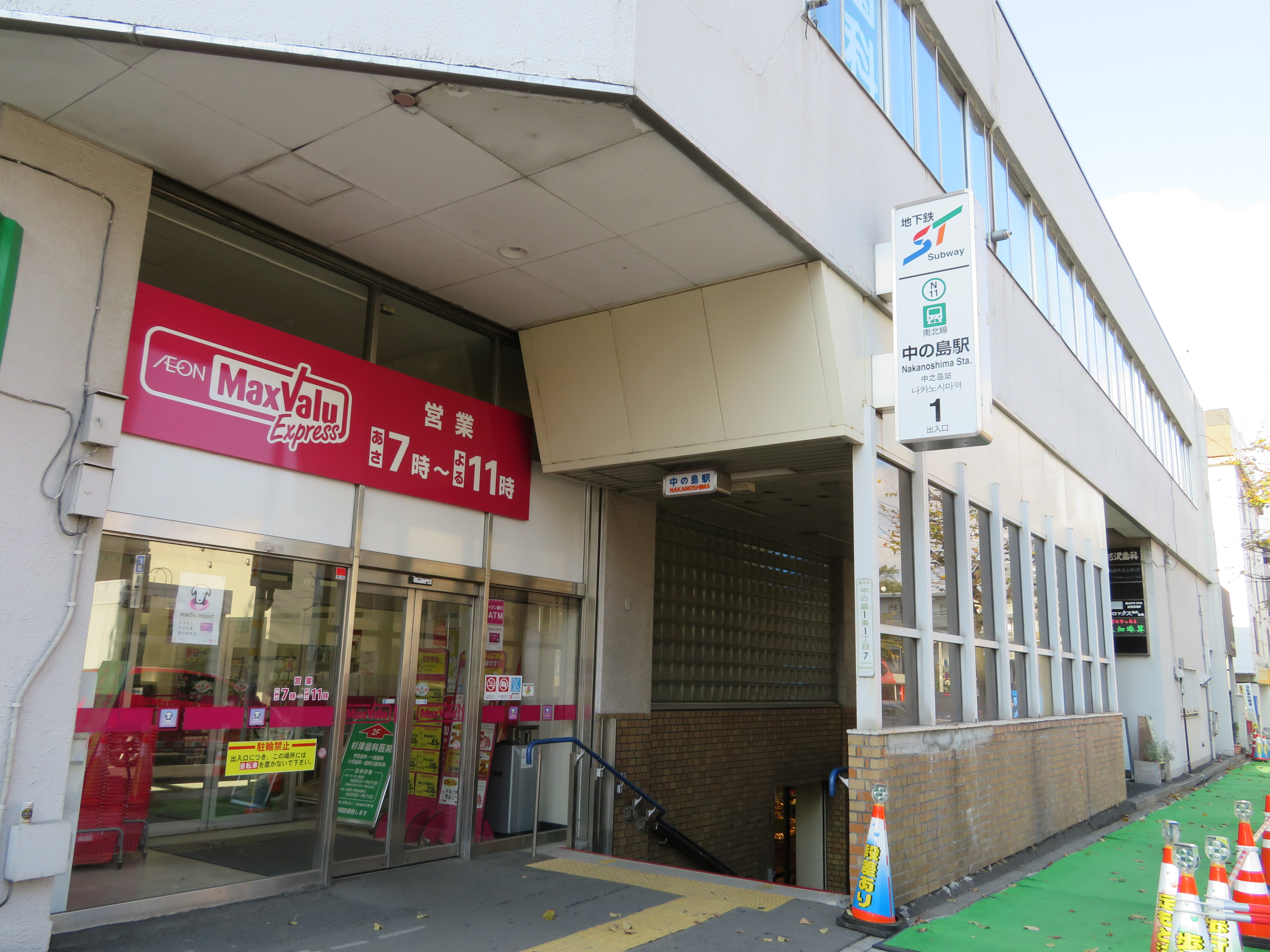 中の島駅1番出入口